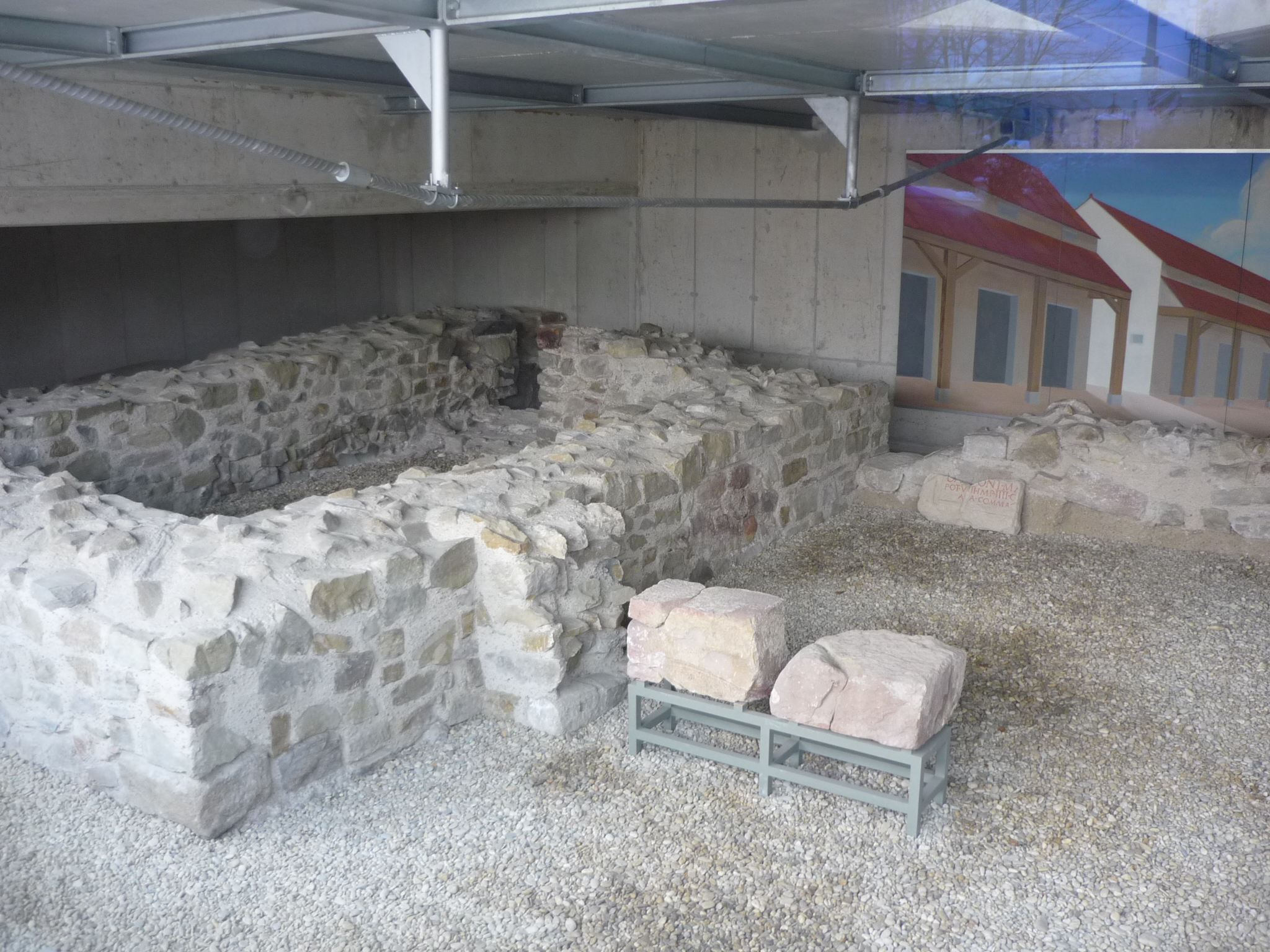 Kastell Comagena in Tulln, Porta principalis dextra, Südlicher Turm